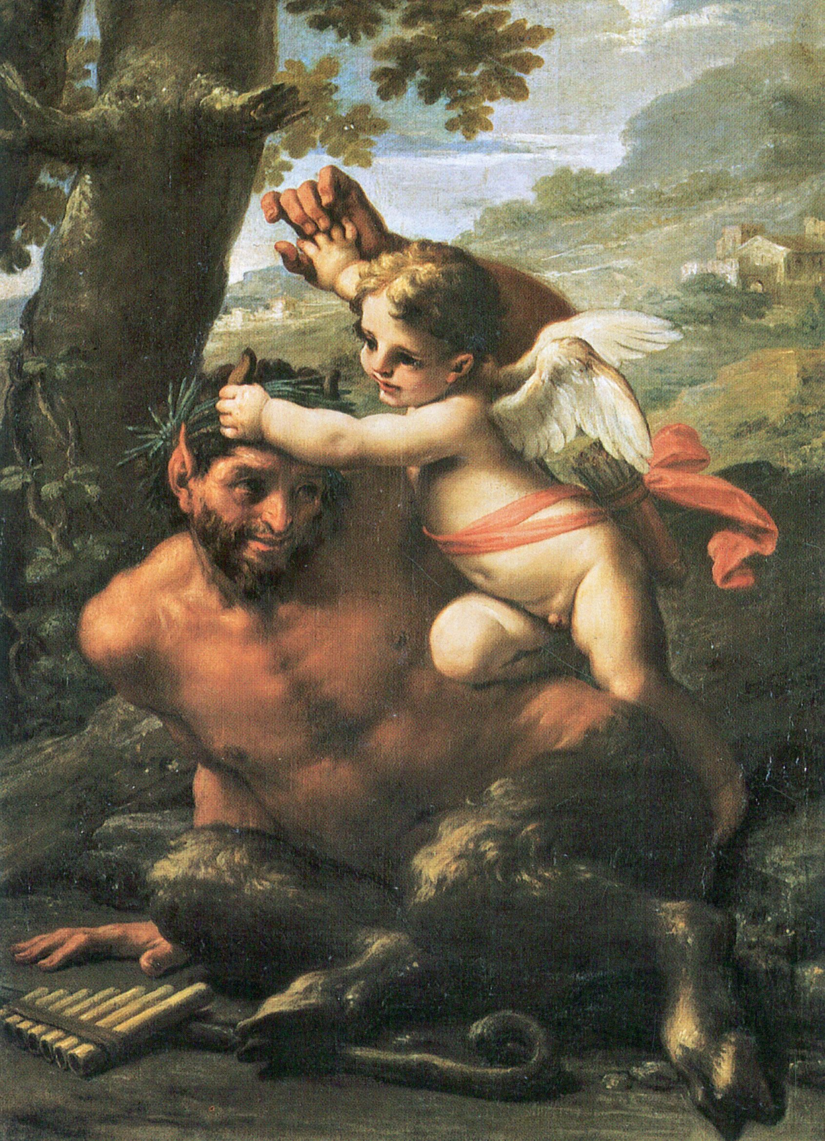 Painting: Der Kampf zwischen Amor und Pan